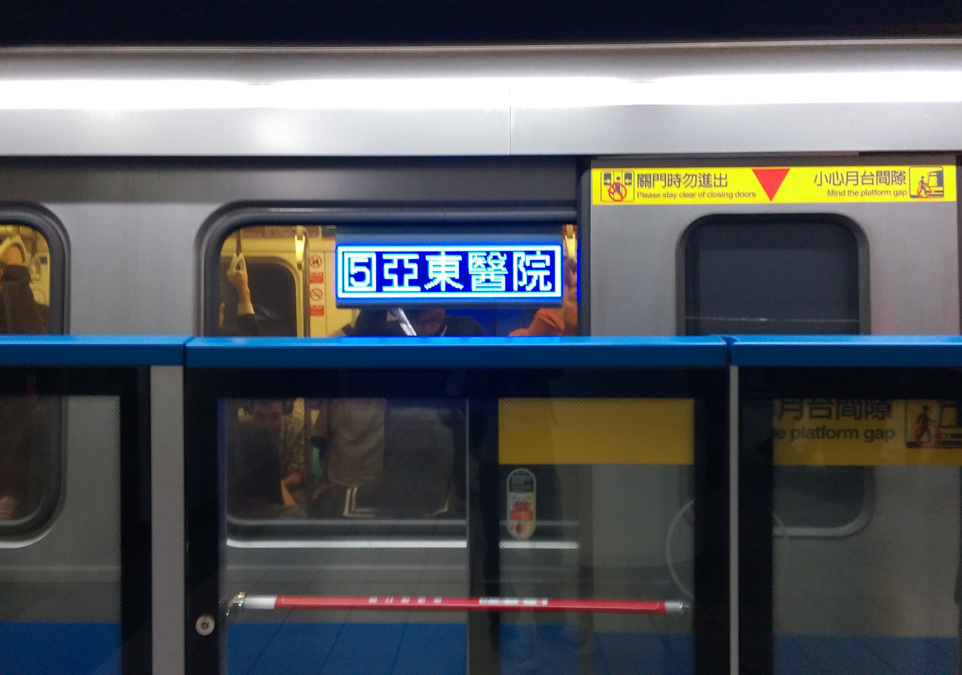 台北捷運321型電聯車車側顯示器改裝，顯示終點站為亞東醫院站。